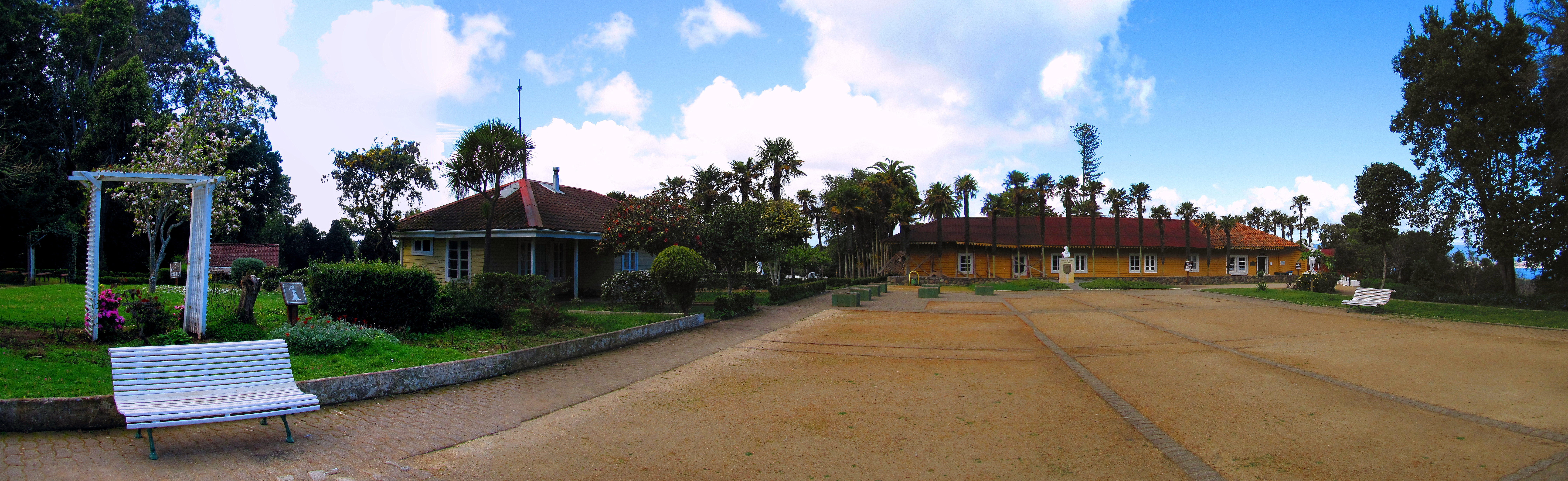 Esta imagen fue tomada durante una salida familiar a raíz de la celebración de fiestas patrias.